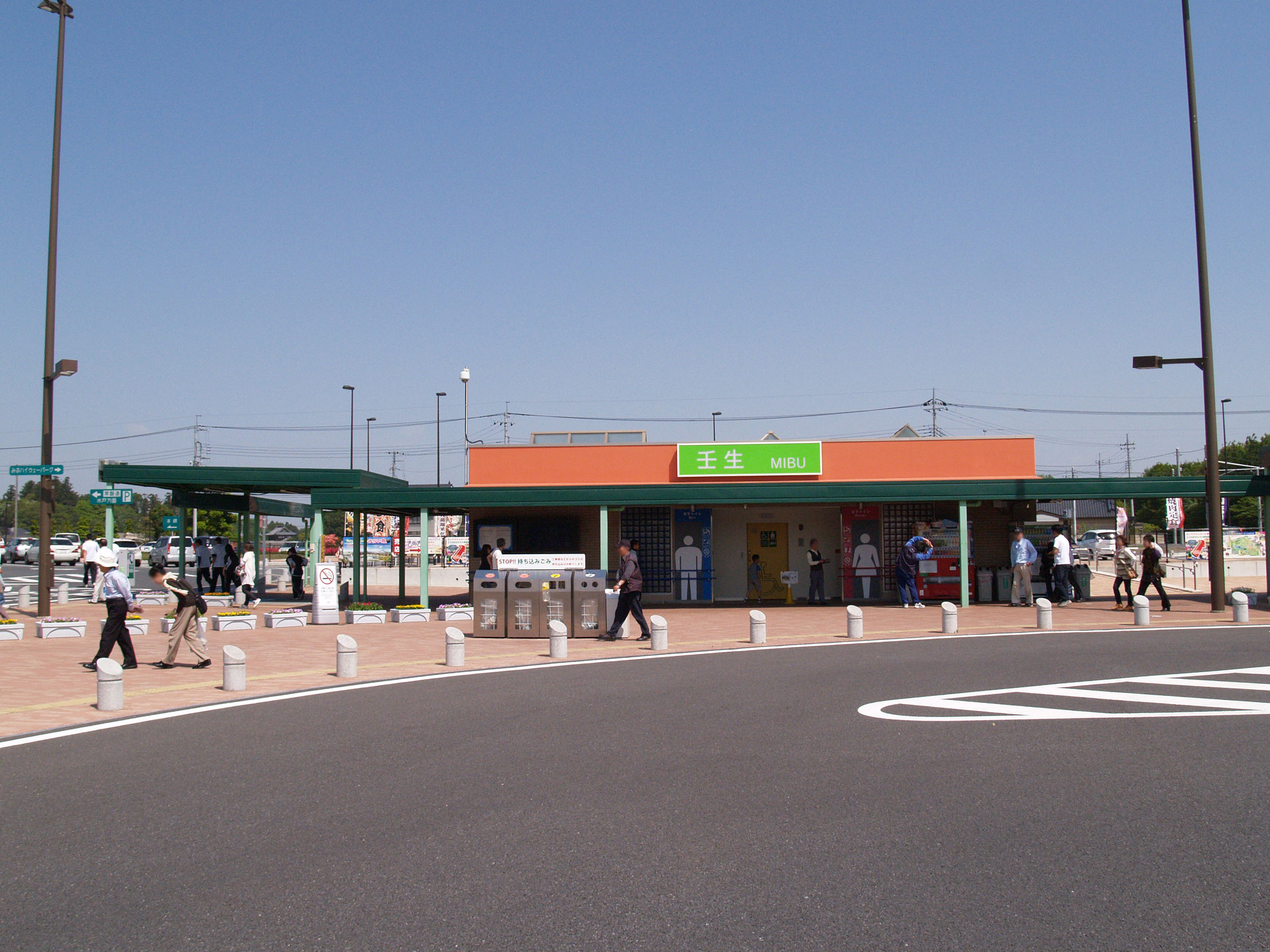 壬生パーキングエリア施設